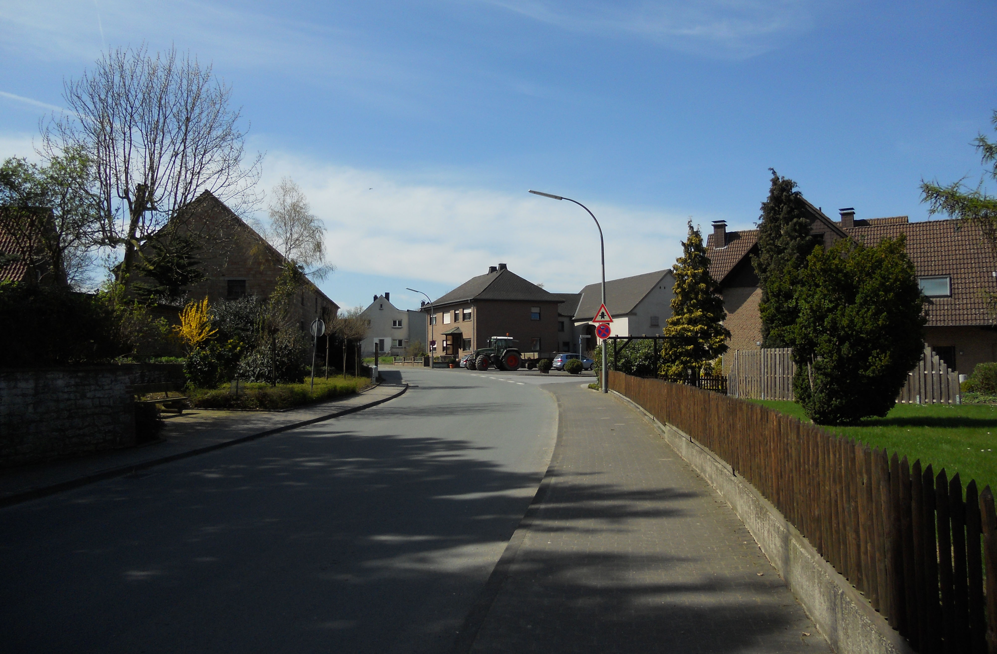 Ortsansicht von Ruhne